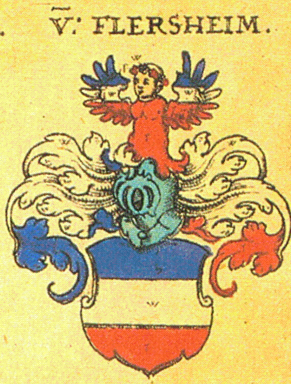 Wappen der Rheinländischen Adelsfamilie Flersheim